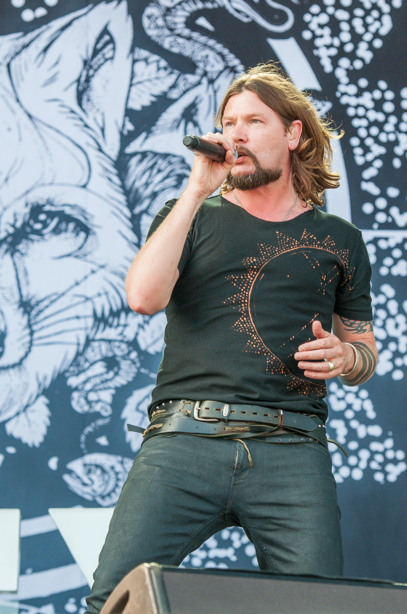 ARGO-Konzerte,Centerstage,Konzert,Livekonzert,Livemusik,Musik,Rea Garvey,RiP,Rock im Park 2014